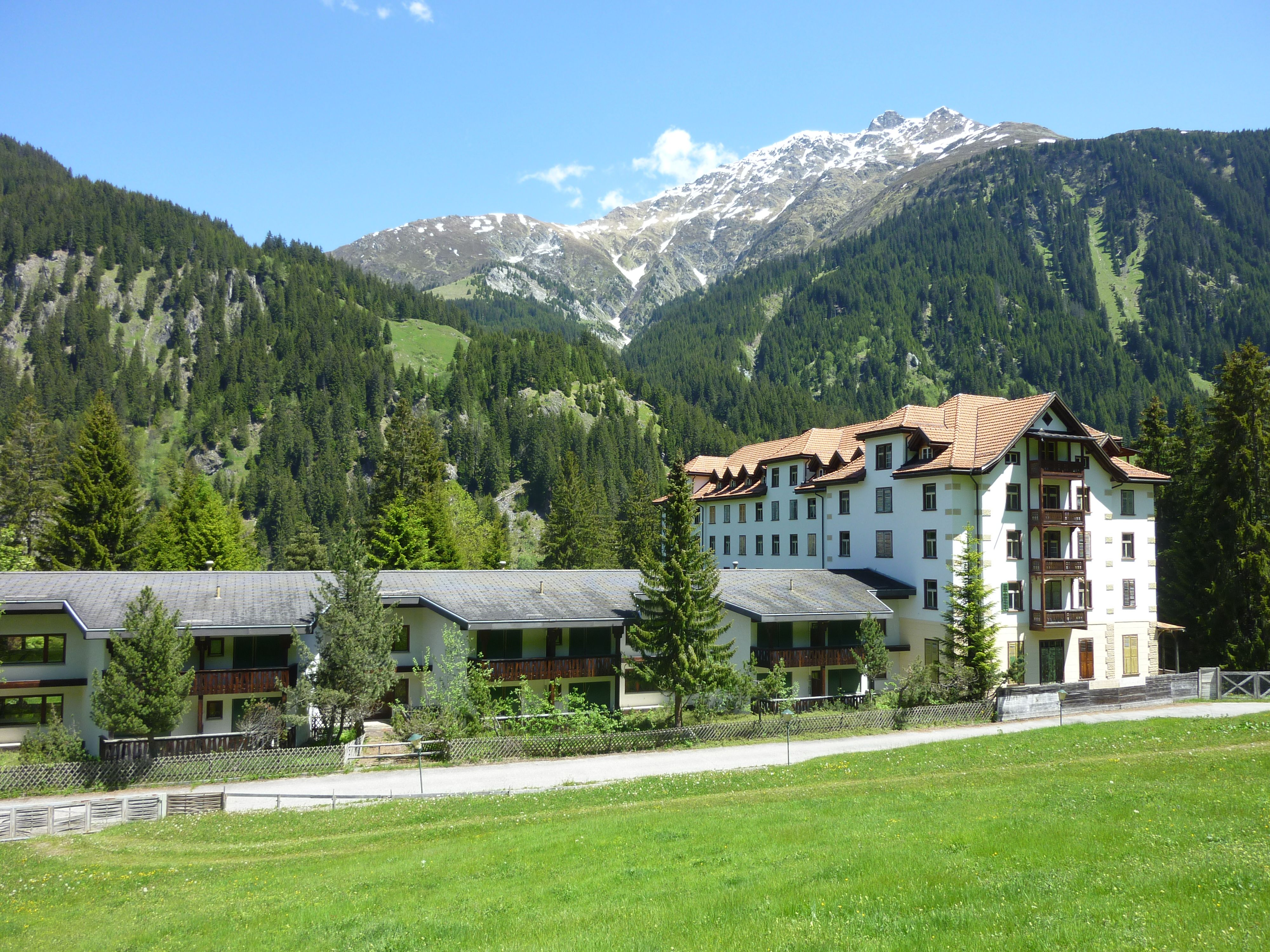 ehemaliges Hotel Tenigerbad im Val Sumvitg